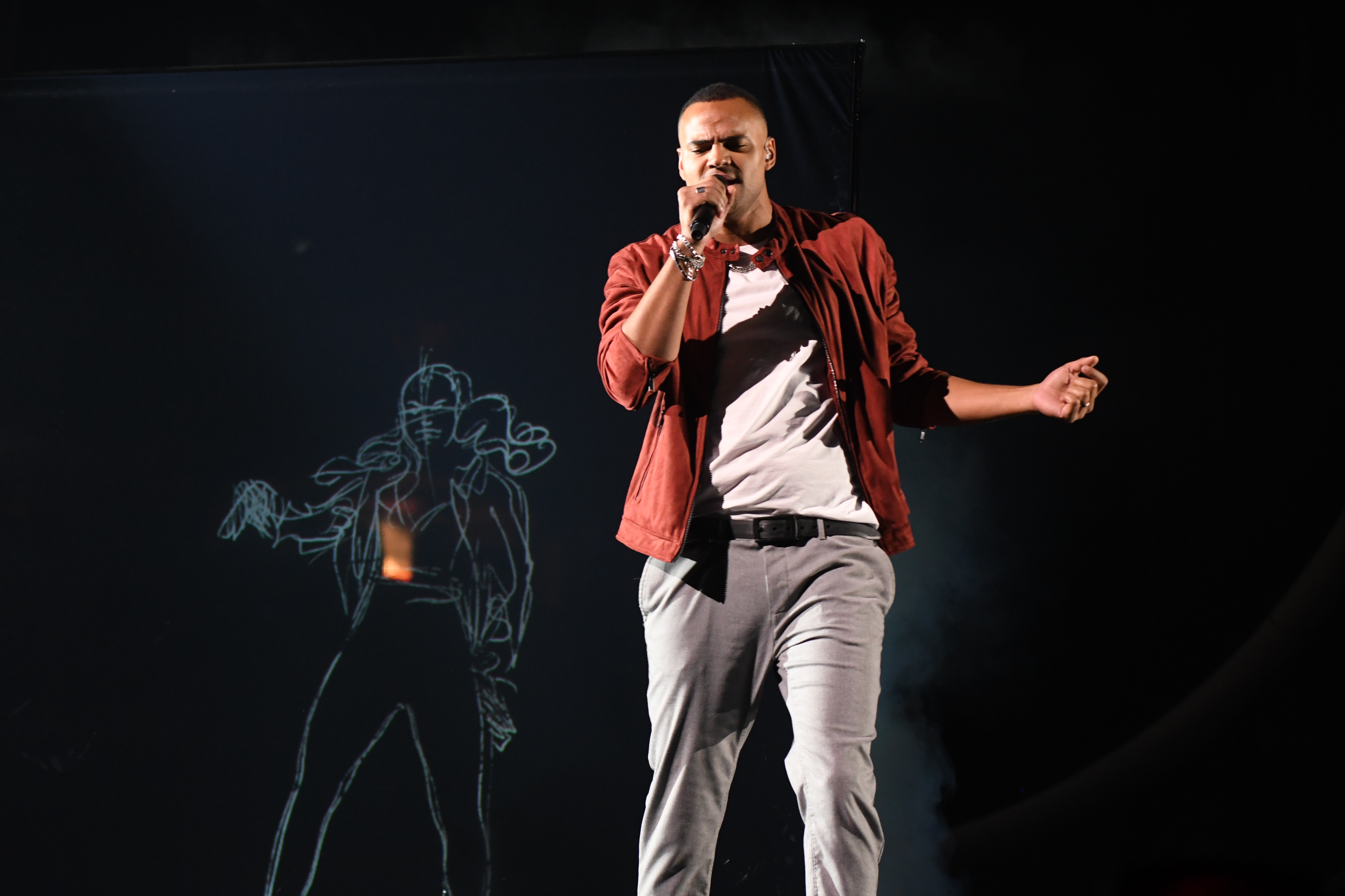 Melodifestivalen 2019, deltävling 1, Scandinavium, Göteborg, Mohombi